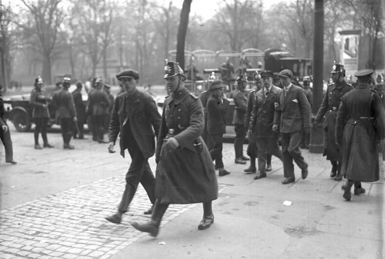 Die grossen Mai-Unruhen in Berlin! Abführen widerspenstiger Demonstranten ins Polizeigewahrsam.